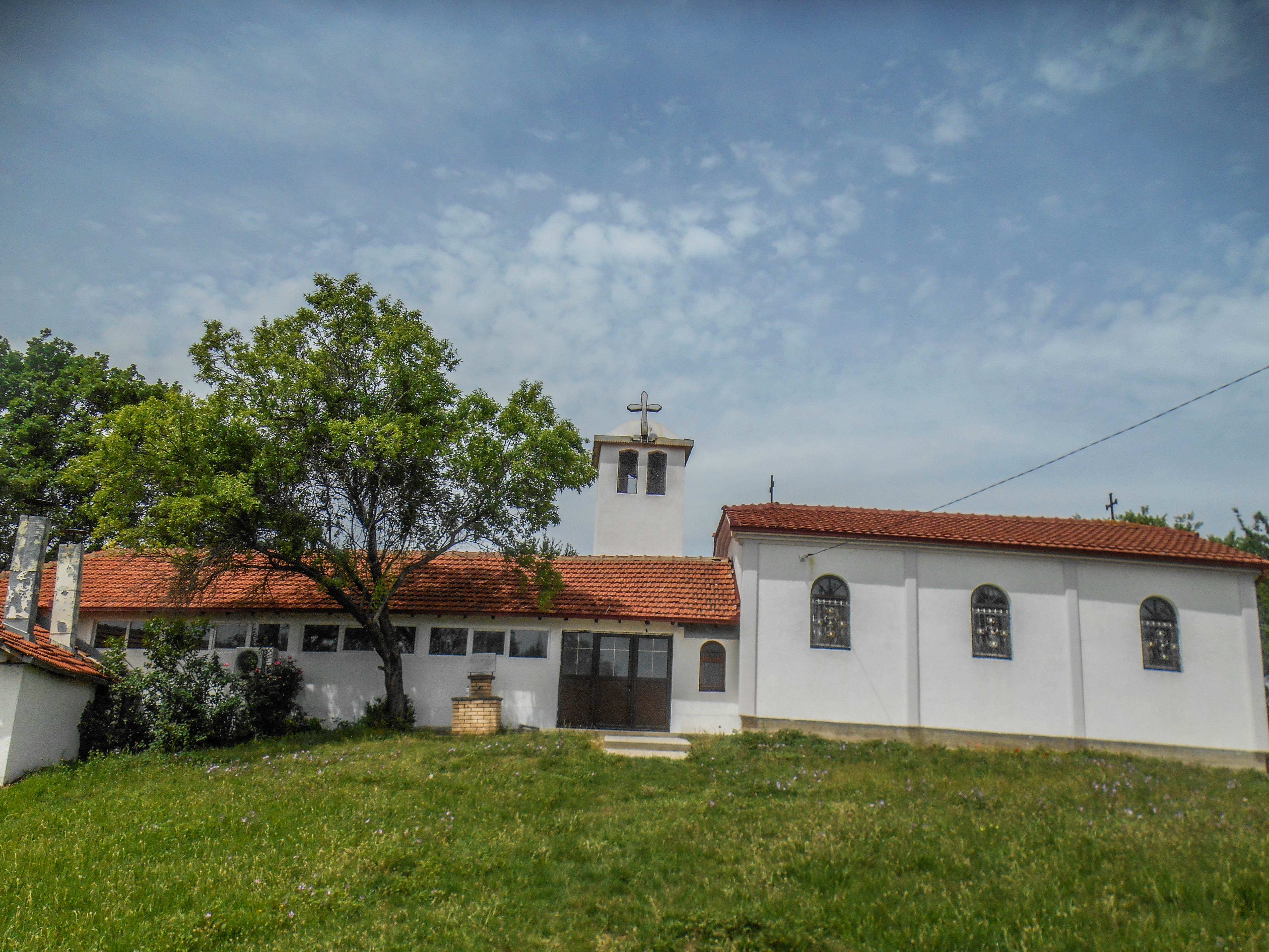 Црква „Св. Димитриј“ - Сушево